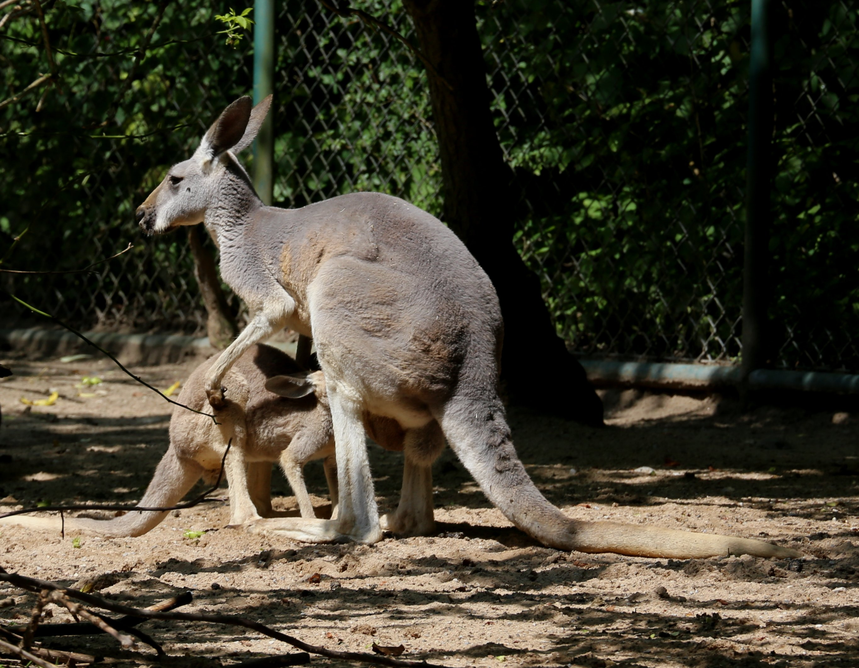 Rotes Riesenkänguru (Macropus rufus) im Tierpark Hellabrunn, München